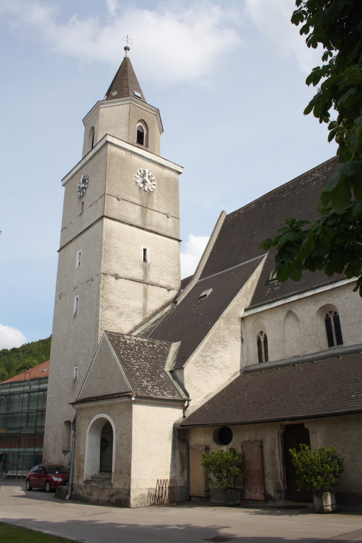 Pfarrkirche St. Andrä vor dem Hagentale der Marktgemeinde St. Andrä-Wördern